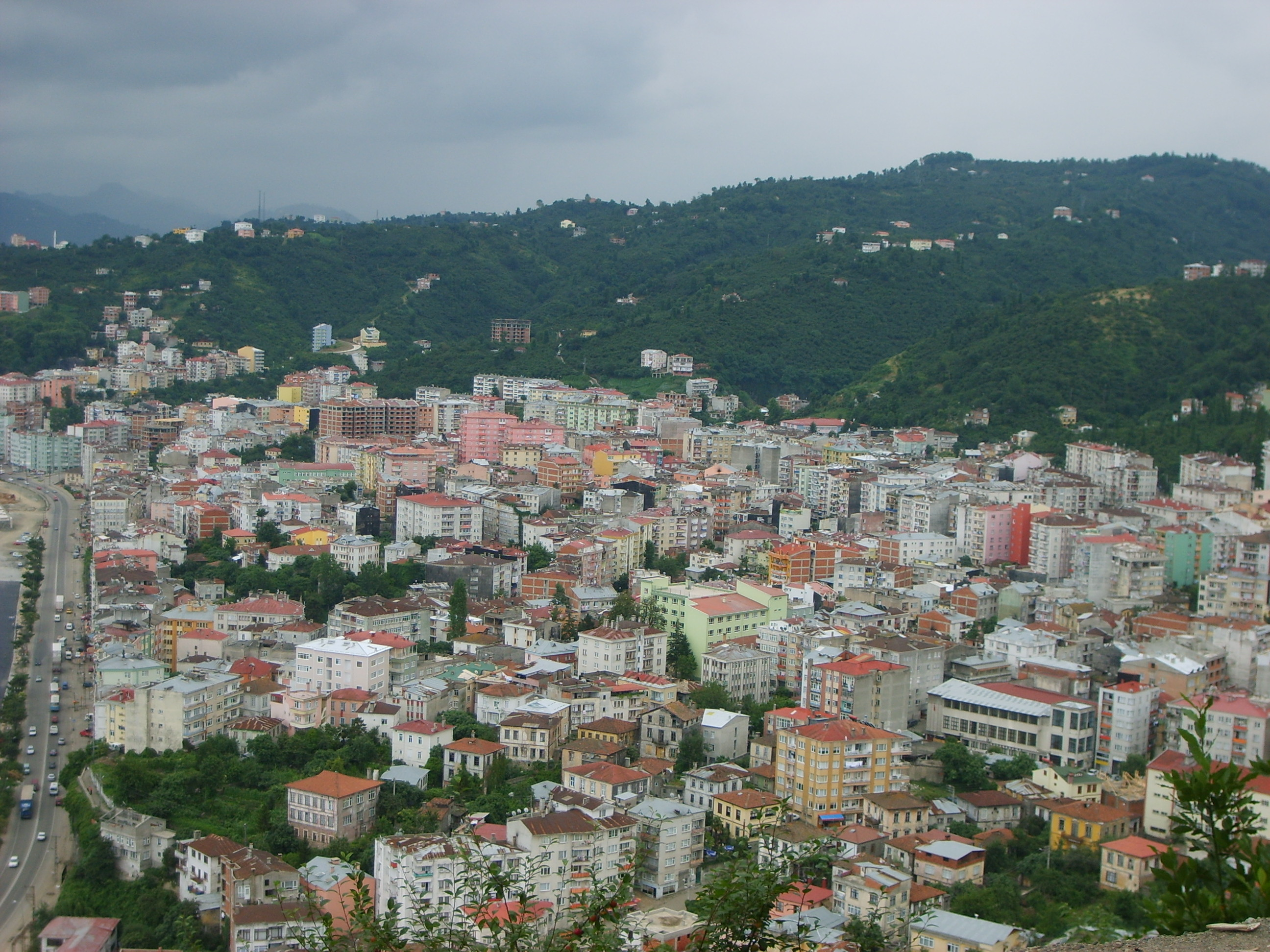 bana ait